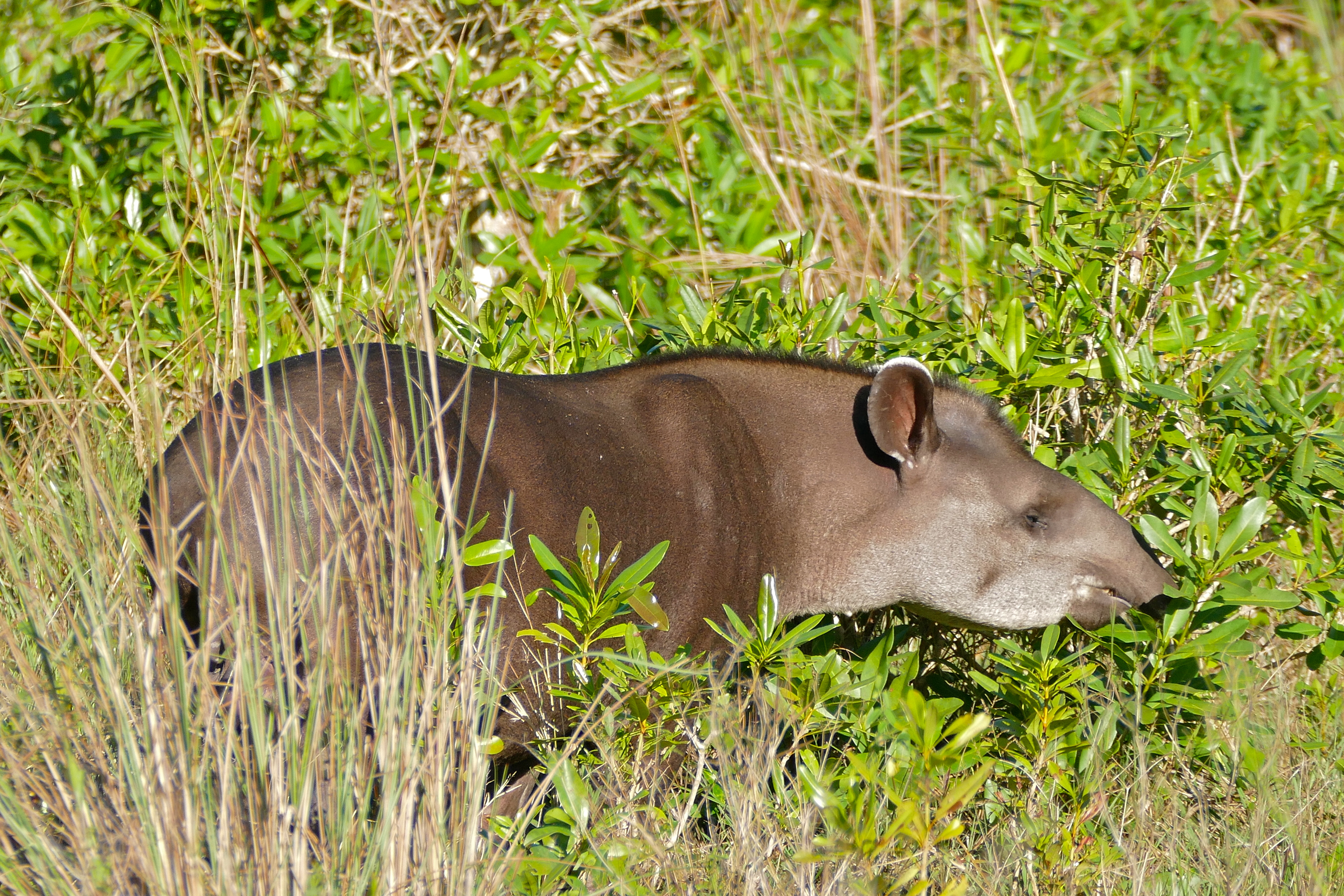 Pouso Alegre, Transpantaneira, Poconé, Mato Grosso, BRAZIL